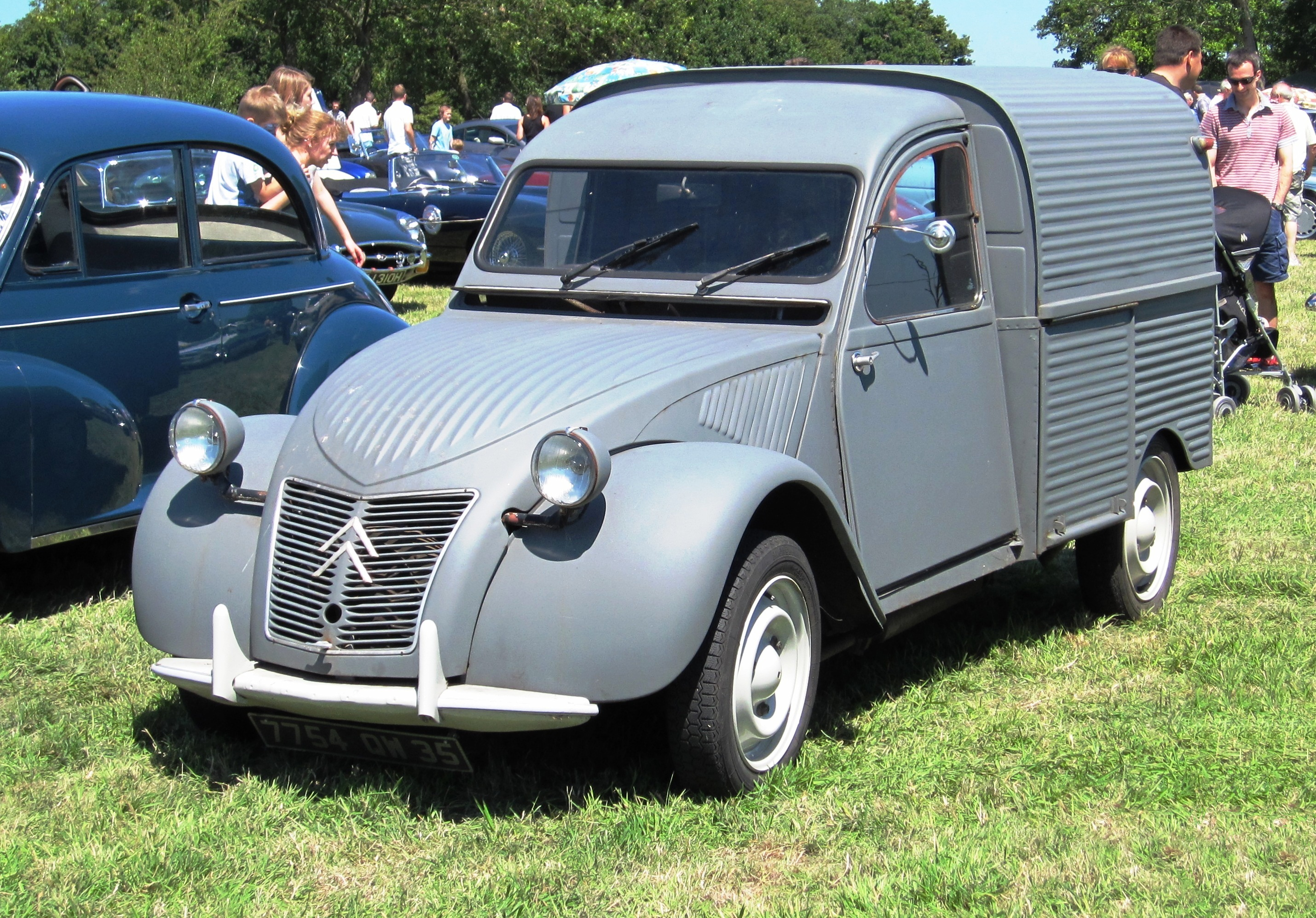 Citroen 2CV fourgonette provenance Ille-et-Vilaine